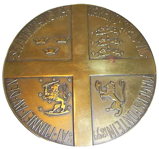 Medalje uitgereik aan lede van die Skandinawiese Korps.